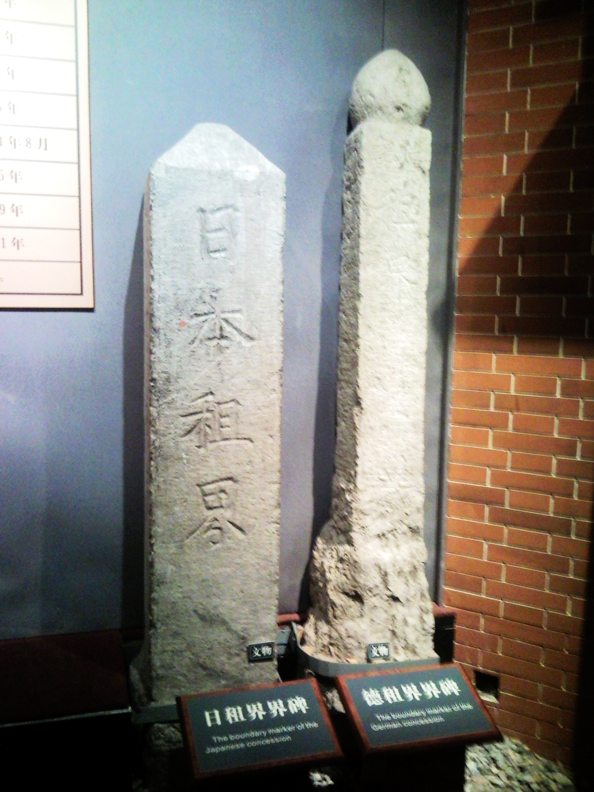 天津博物馆 - 天津日租界和德租界界碑